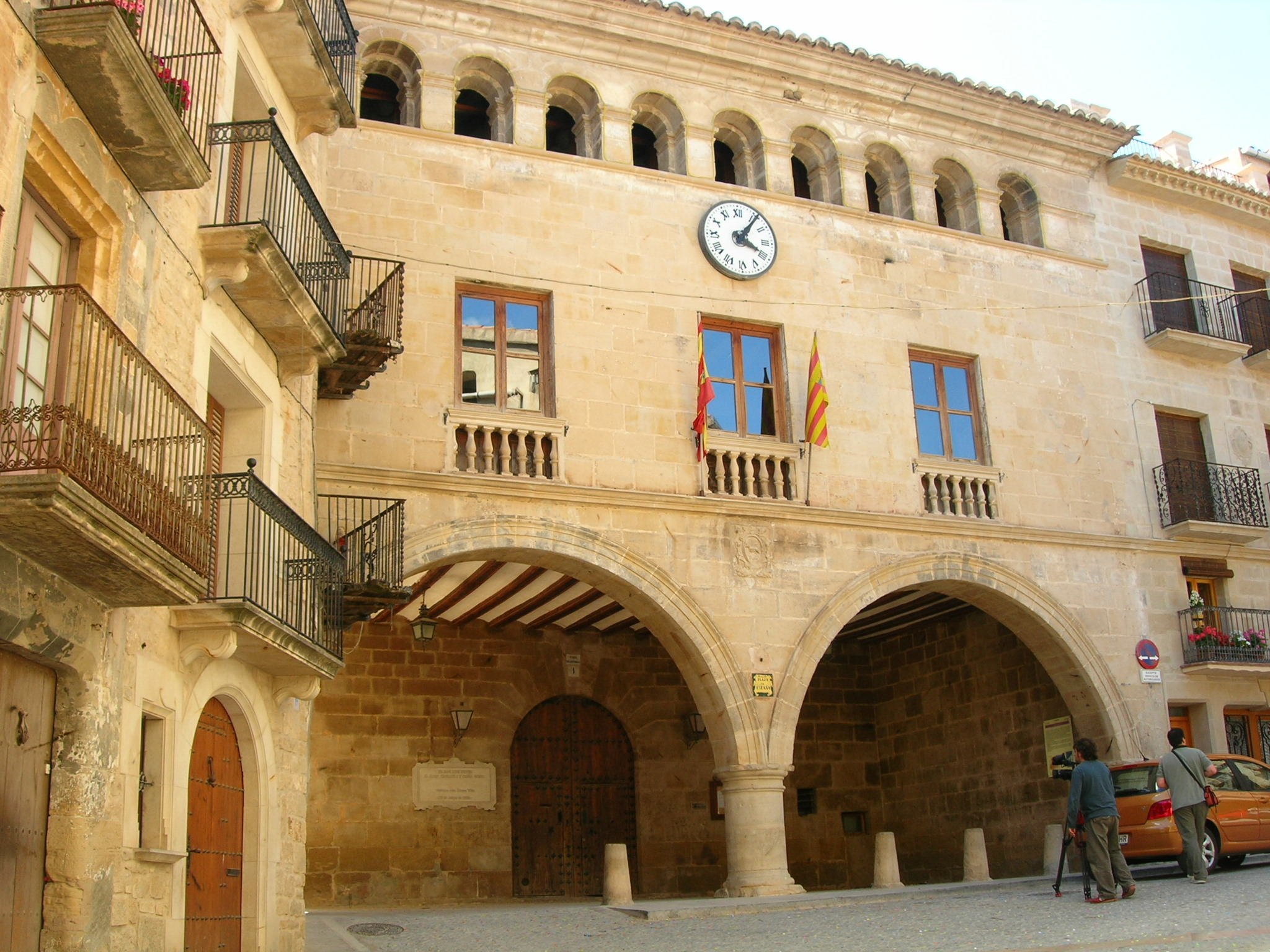 Vila de Calaceit